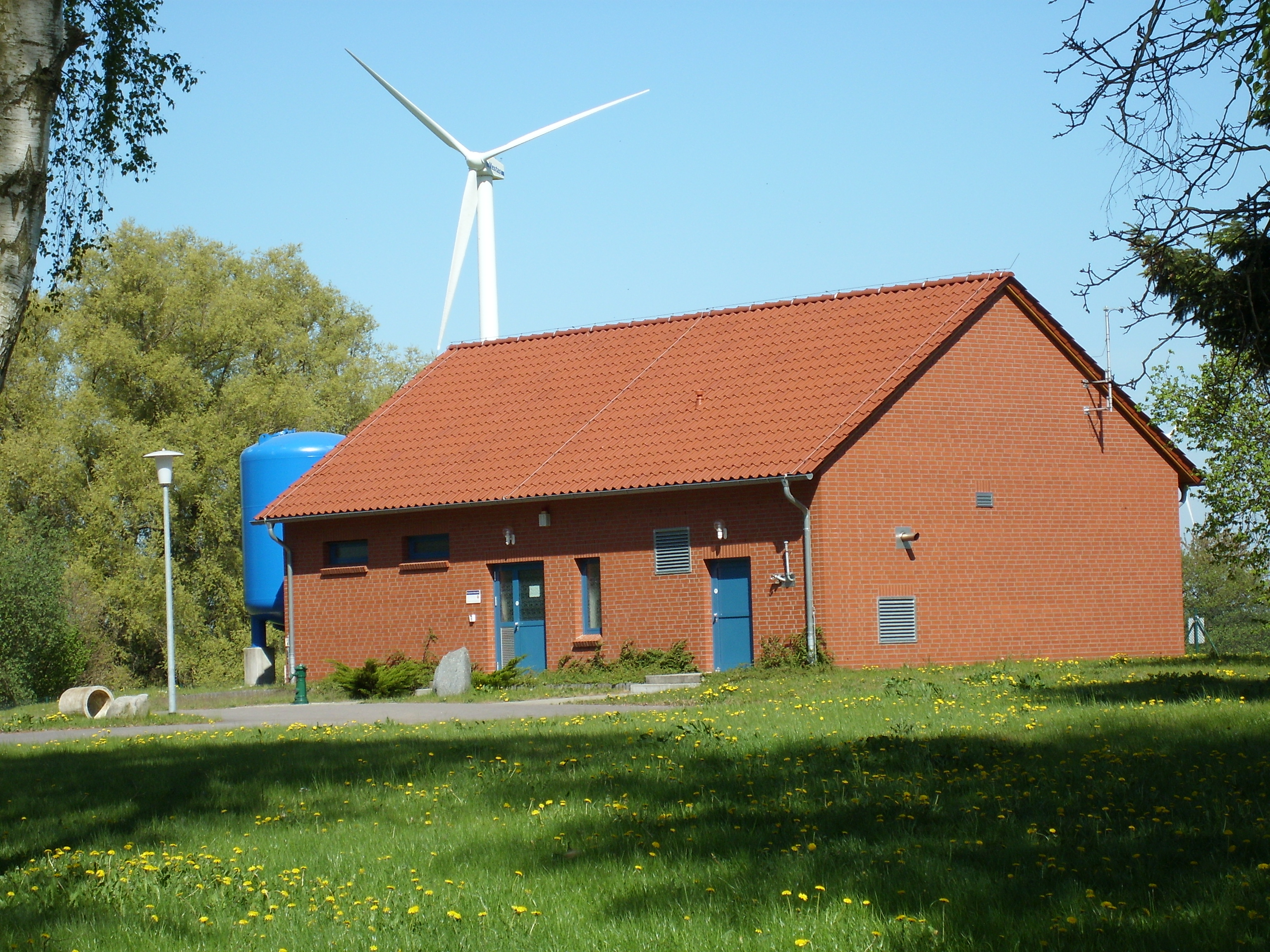 Gebäude des Wasserwerks Hohenmühl (betrieben von den Wasserwerken Greifswald) im Weitenhagener Ortsteil Helmshagen II